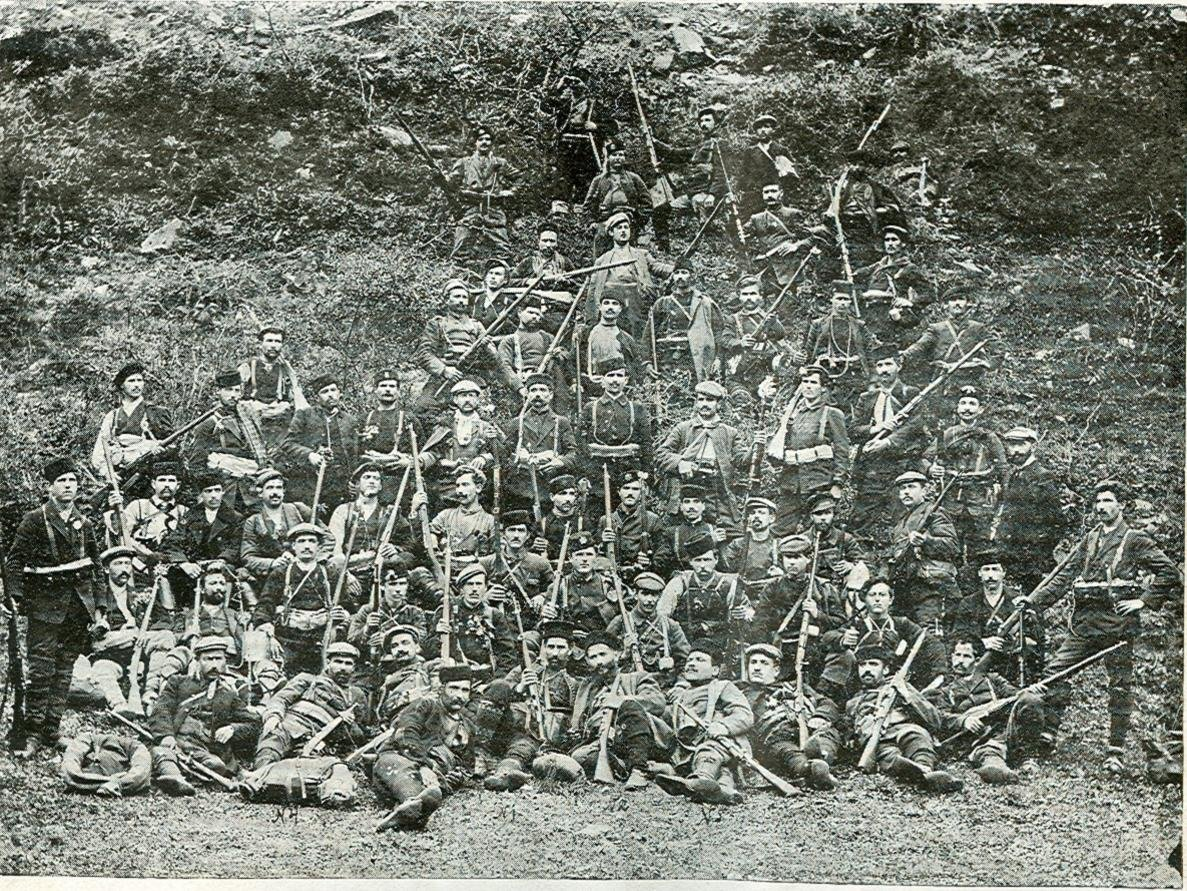 Четата на Георги Мончев.